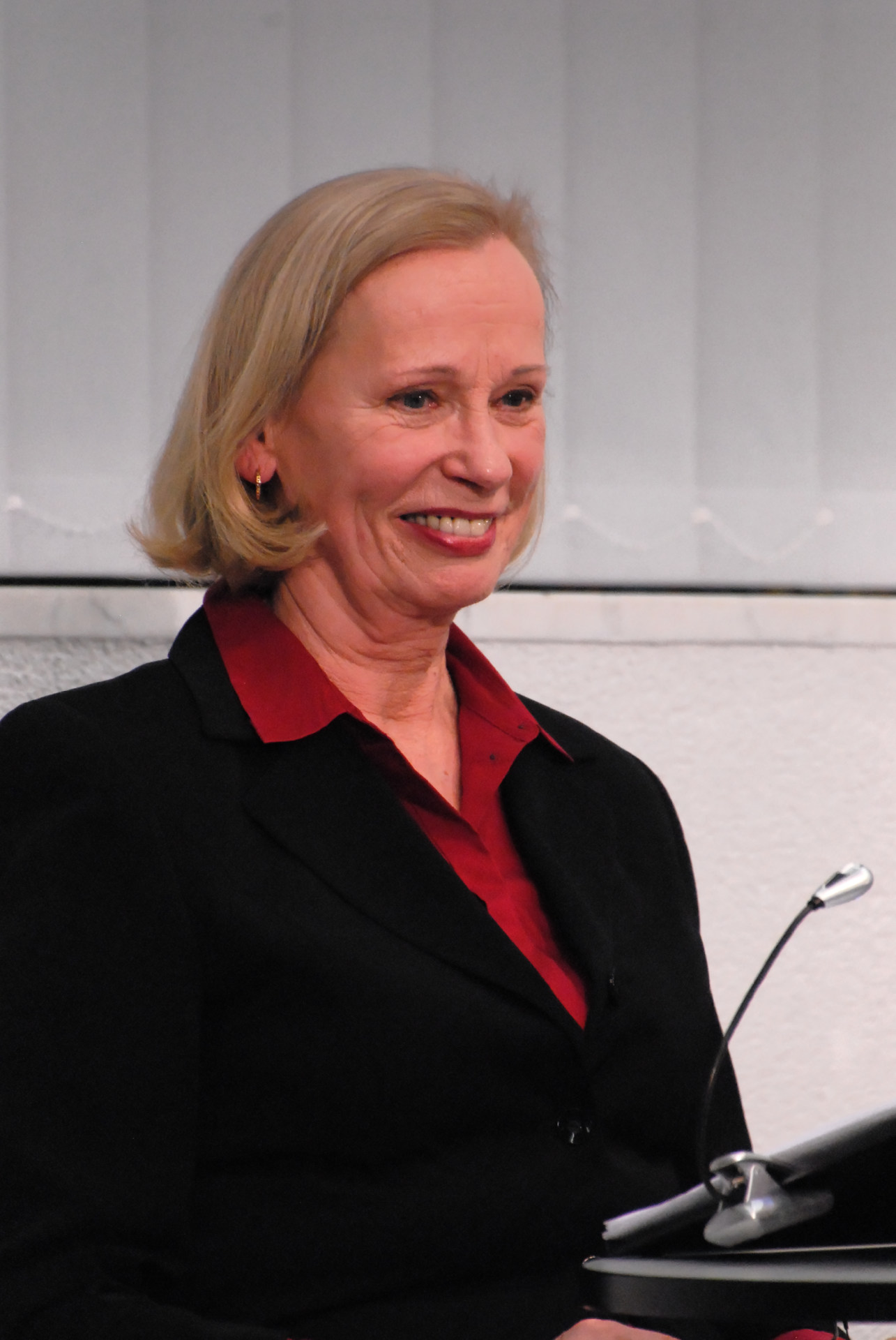 Christiane Lemm in der Zentralbibliothek in Düsseldorf